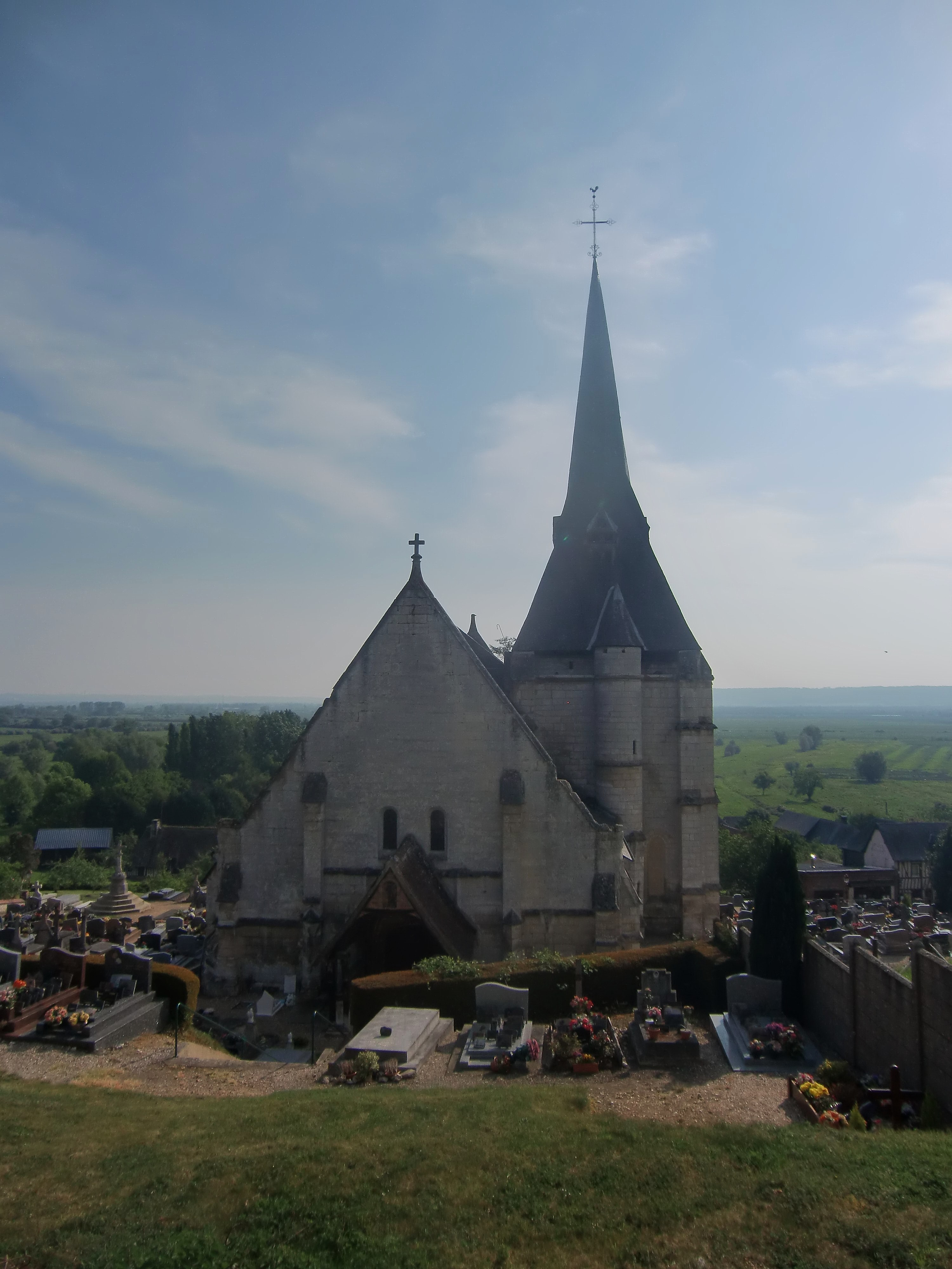 Église de Marais-Vernier (Eure, Normandie, France)